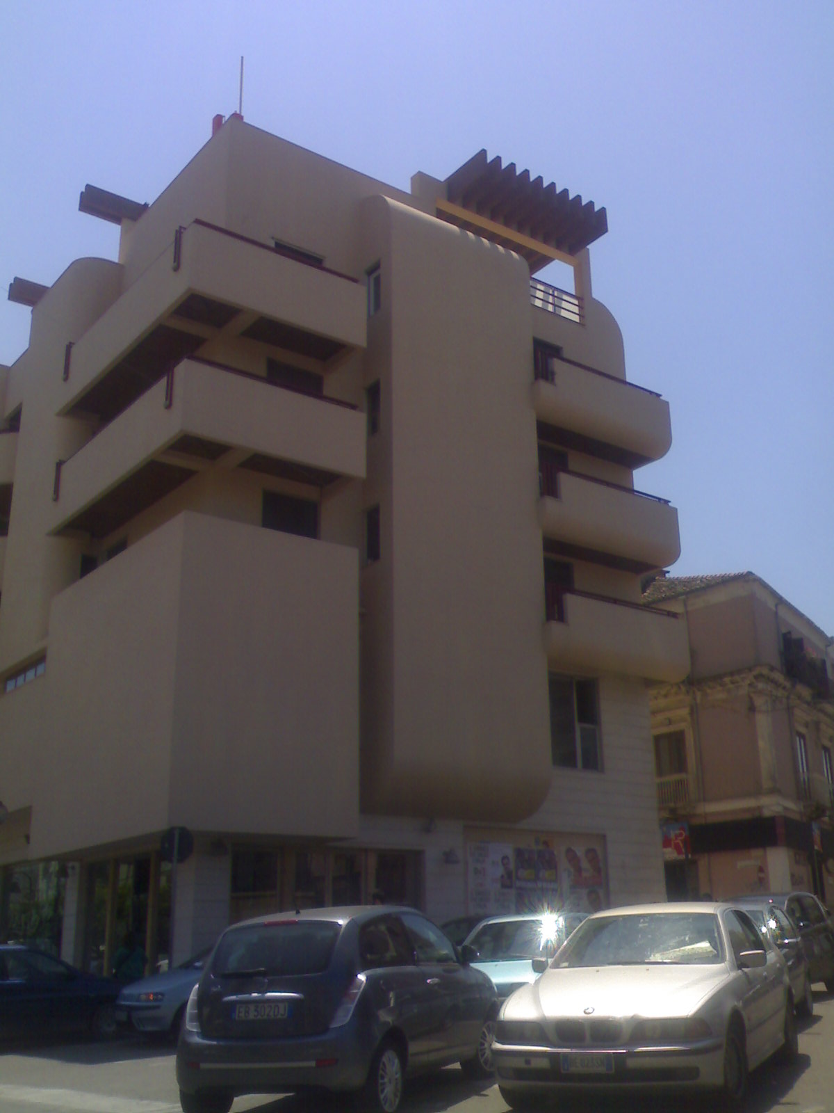 La sede principale di Video Calabria in Piazza Pitagora a Crotone